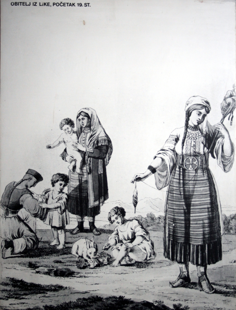 snimljeno tijekom Noći muzeja u Etnografskom muzeju u Zagrebu